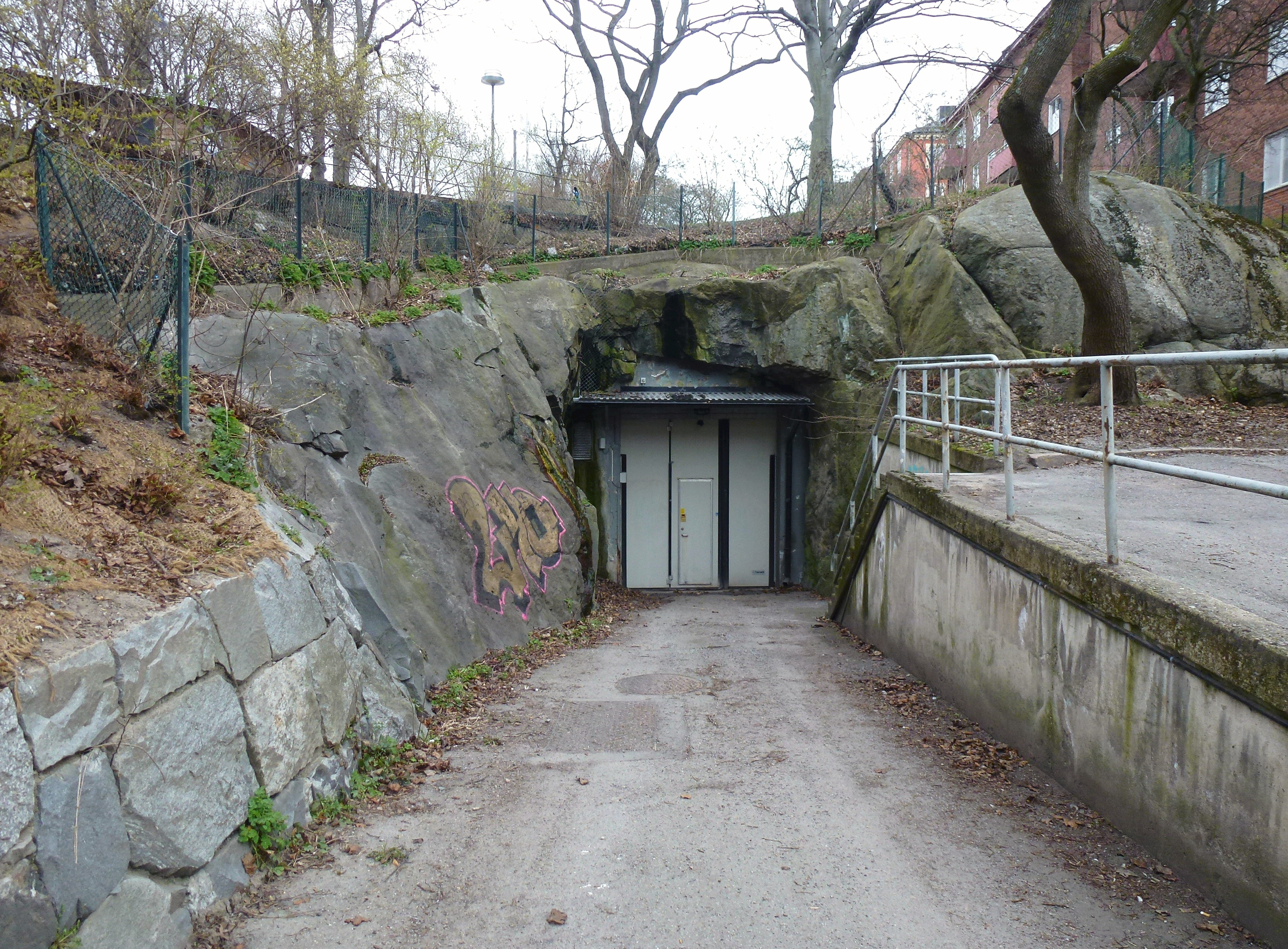 F.d. Lednings Central "Krokusen" vid Kungsholmens brandstation (infart)